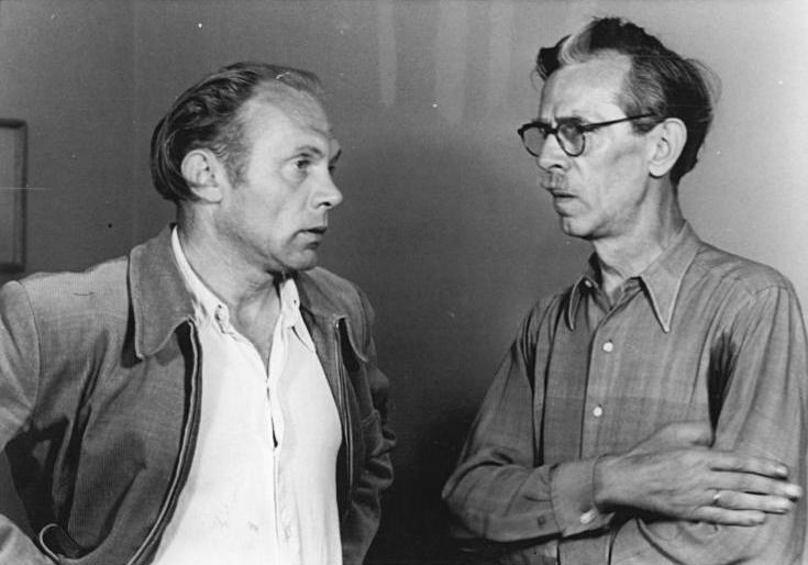 VBK-Gründung, Arno Mohr, Otto Nagel Gründung des Verbandes bildender Künstler Am 17. und 18.6.50 wurde auf einem vom Kulturbund eingerufenen Kongreß der Verband bildender Künstler gegründet. UBz: Professor Arno Mohr (links) begrüßt Professor Nagel Aufn. Illus Rudolph 6871-50 1) Mlk 17.6.50 Abgebildete Personen: Nagel, Otto Prof.: Maler, Präsident der Akademie der Künste (AdK), Nationalpreisträger, Vaterländischer Verdienstorden (VVO) in Gold, DDR (PND 118586300)